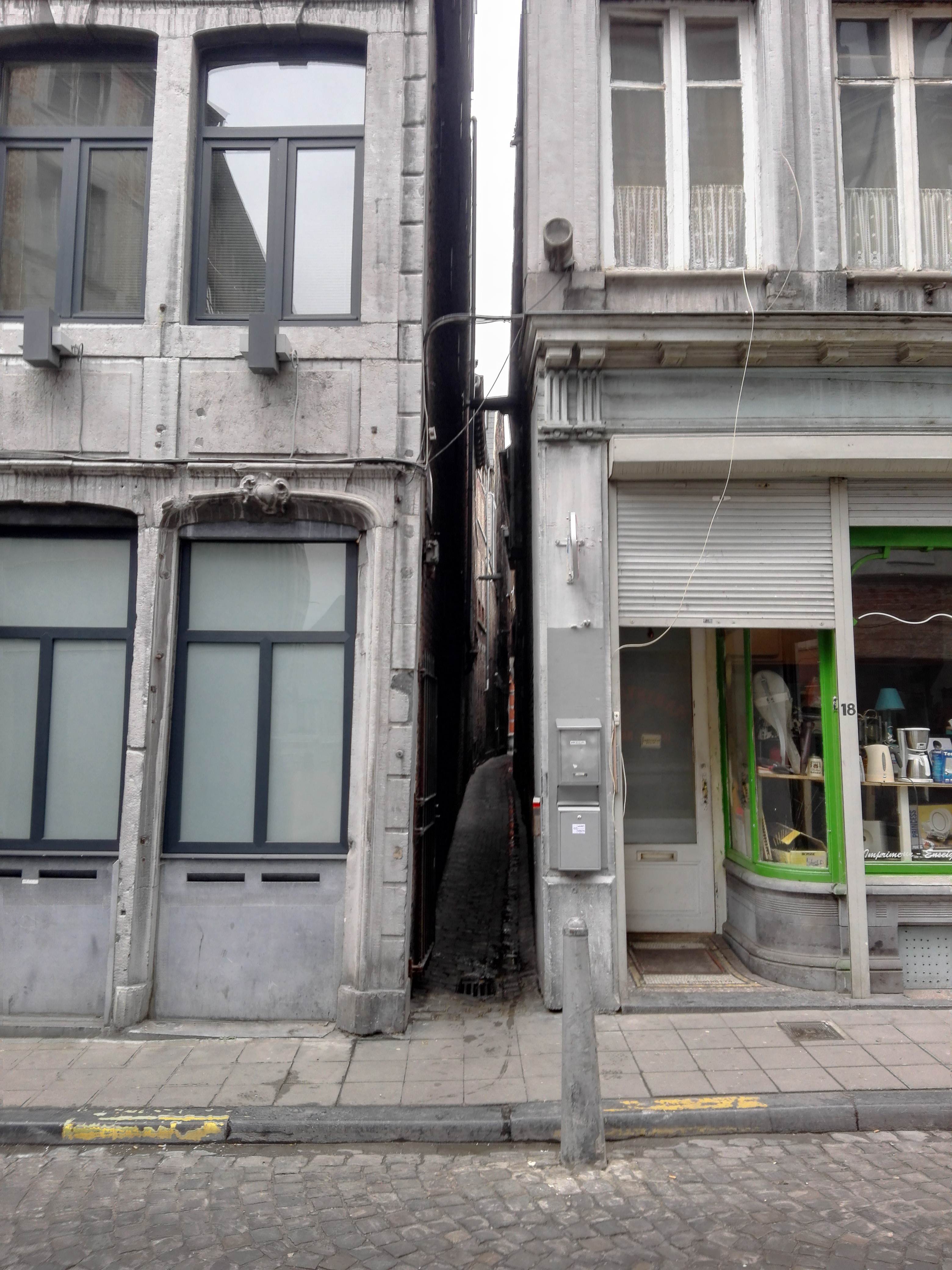 Tenant de la rue du Carré dans la rue du Pont à Liège